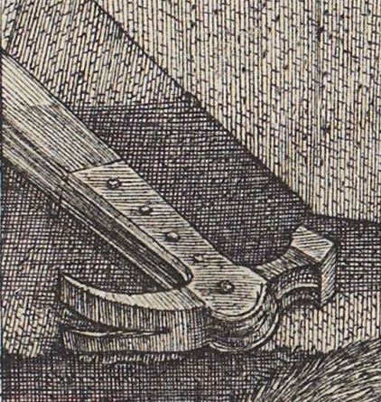 detail: hammer